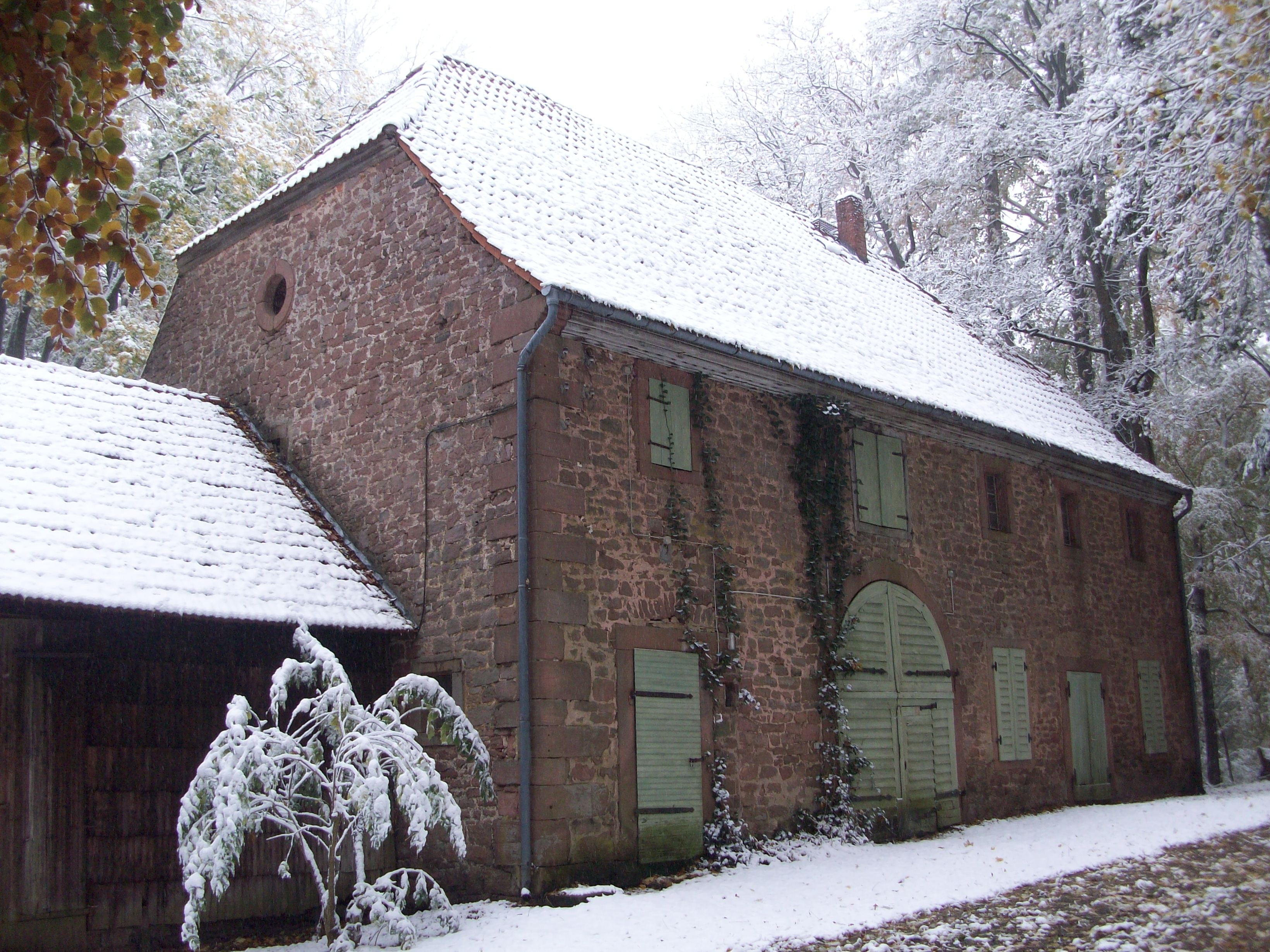 Die Forstscheune des ehem. Jagdschlosses Krähberg, 18. Jahrhundert, großer Bruchsteinbau mit Eckquaderung und Krüppelwalmdach